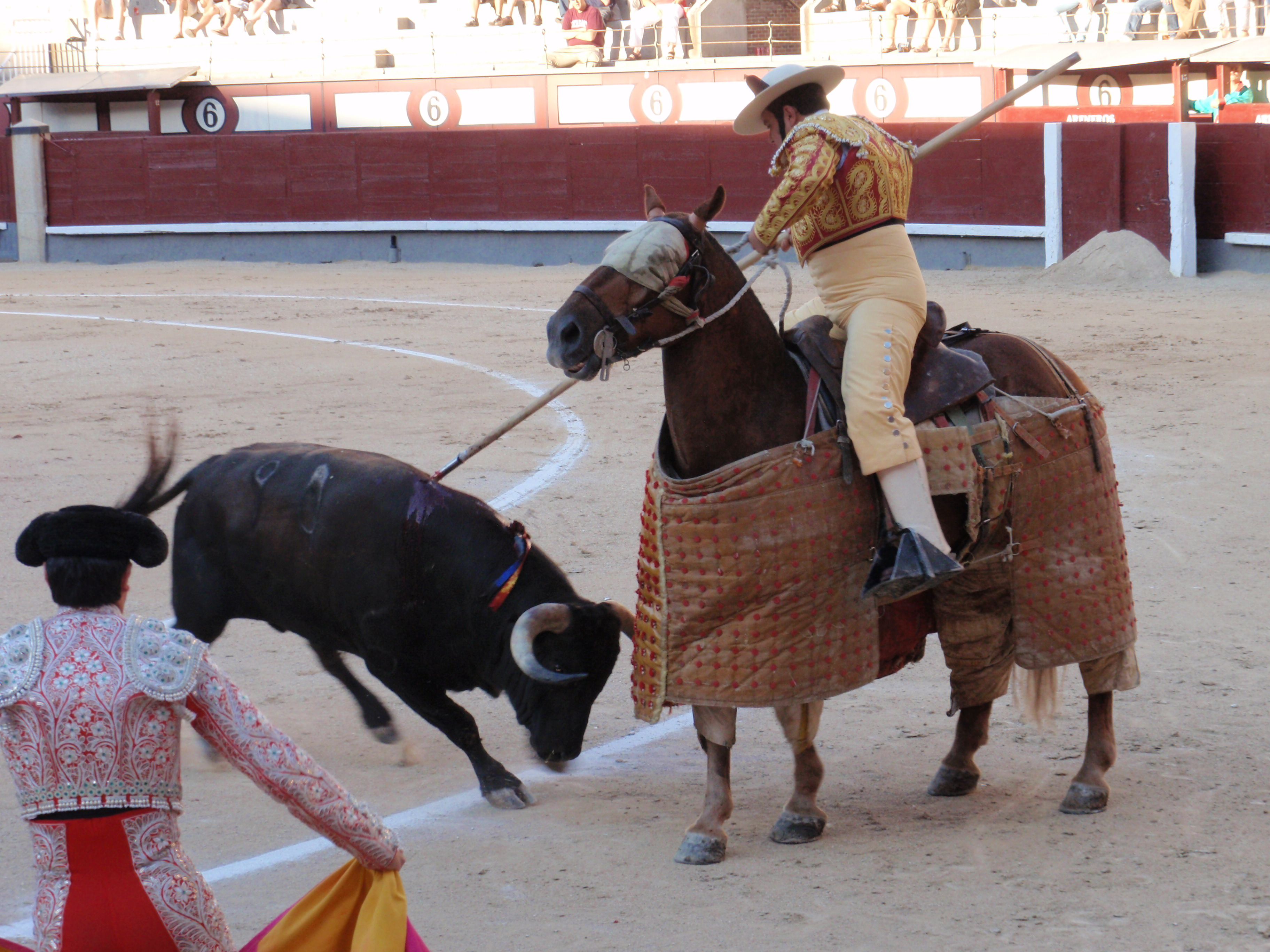 At Plaza de Toros de Las Ventas in Madrid